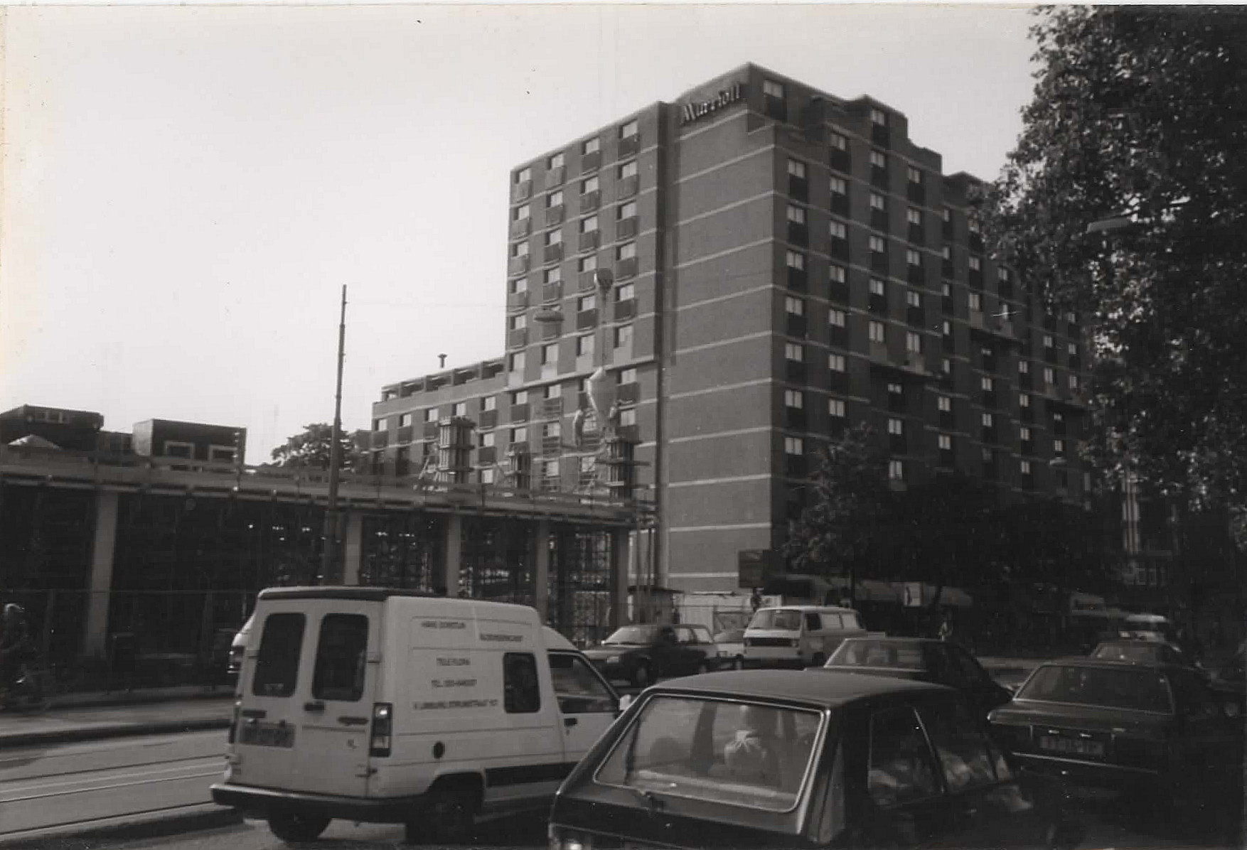 Het Mariott hotel op de Stadhouderskade en het in aanbouw zijnde Byzantium, ergens tussen 1989 en 1991. (precieze aanmaakdatum is onbekend)